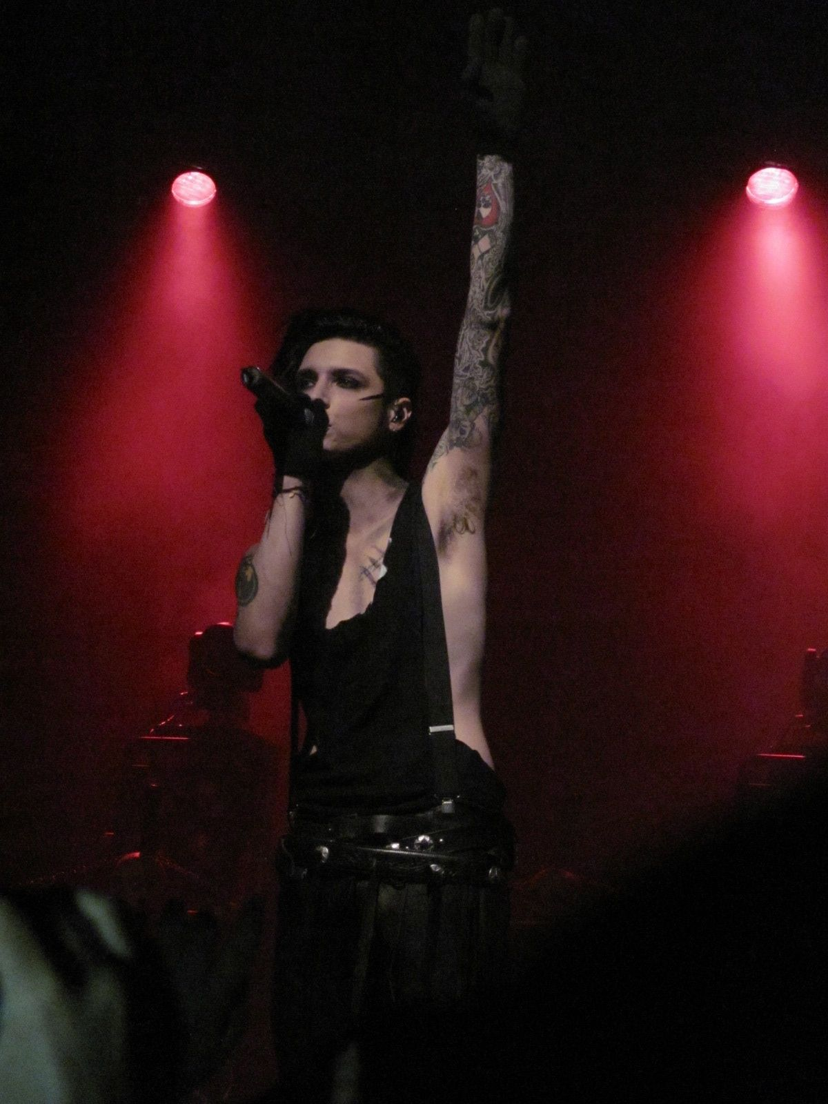 Concierto de la banda Black Veil Brides el 25 de enero de 2013 en Nueva York. En la imagen: Andy Biersack.